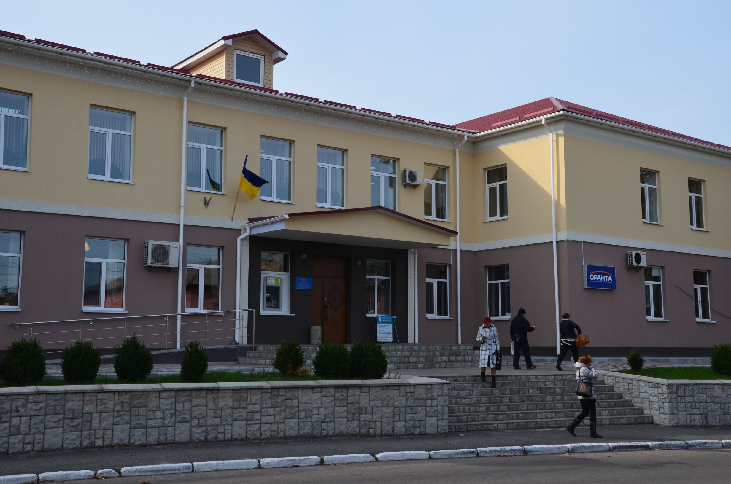 Будівля Тетіївської міської ради